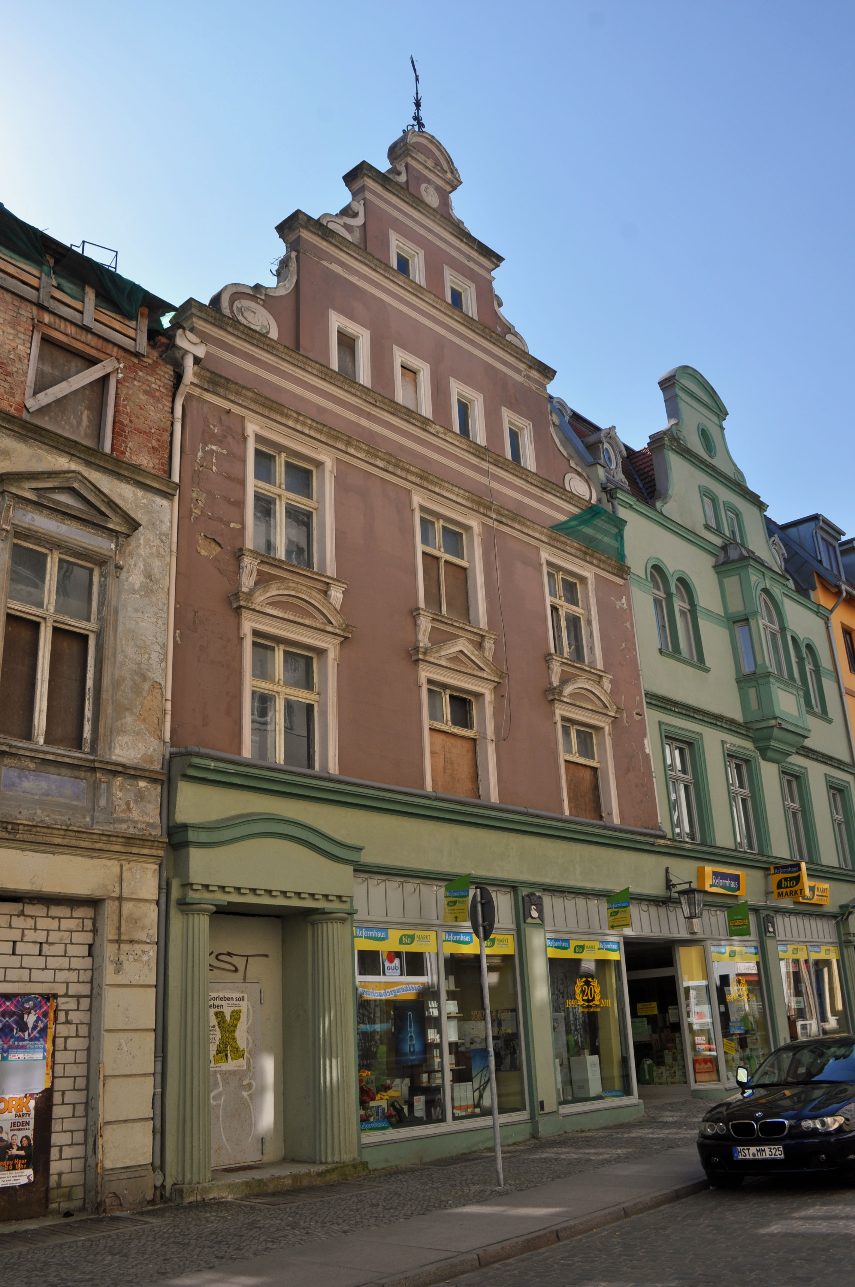 Gebäude bzw. Gebäudedetail in Stralsund. Straße und Hausnummer siehe Dateiname.